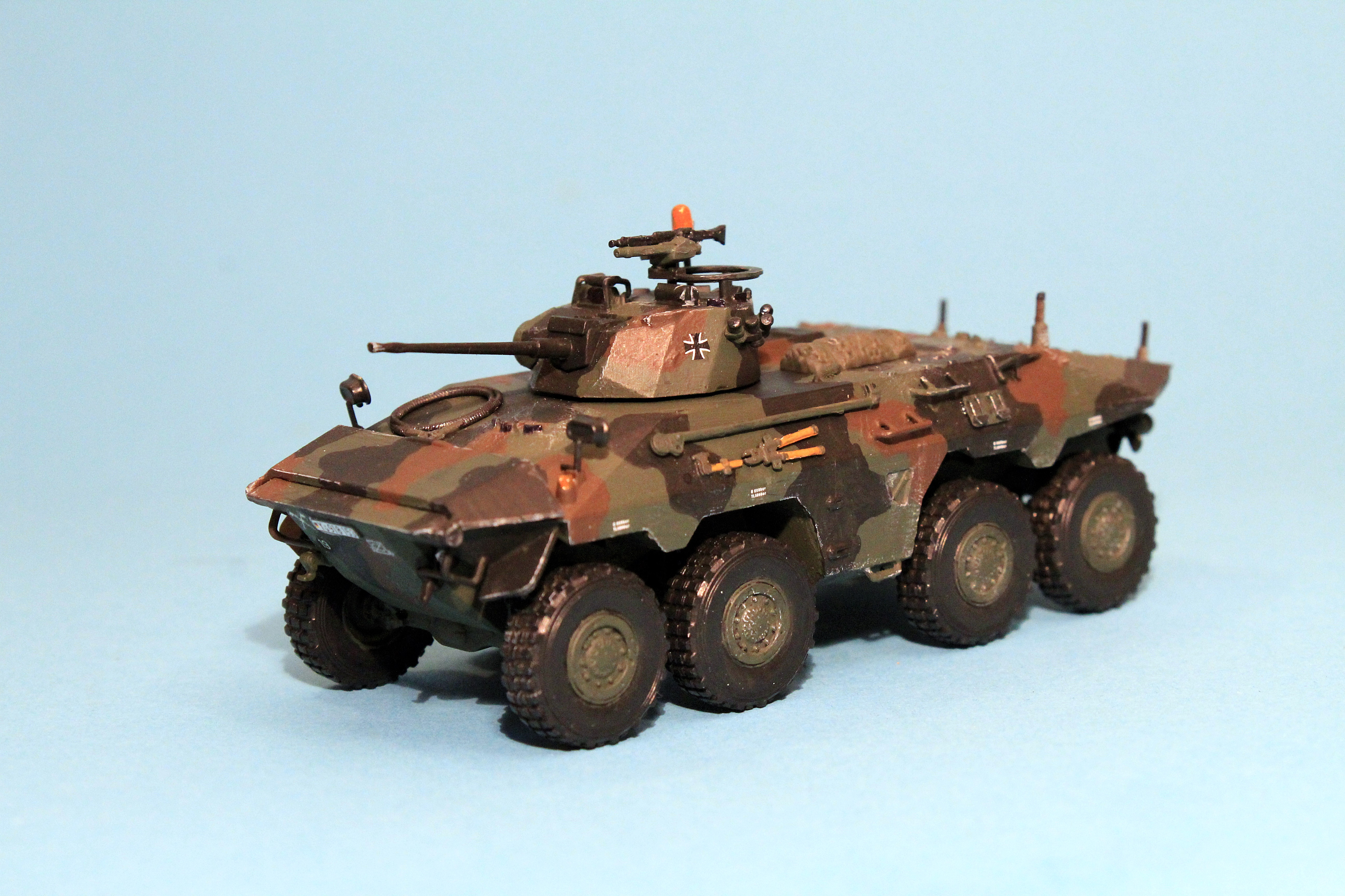 SpPz Luchs A2 (1985 - 2008) der Bundeswehr Modell in 1:72